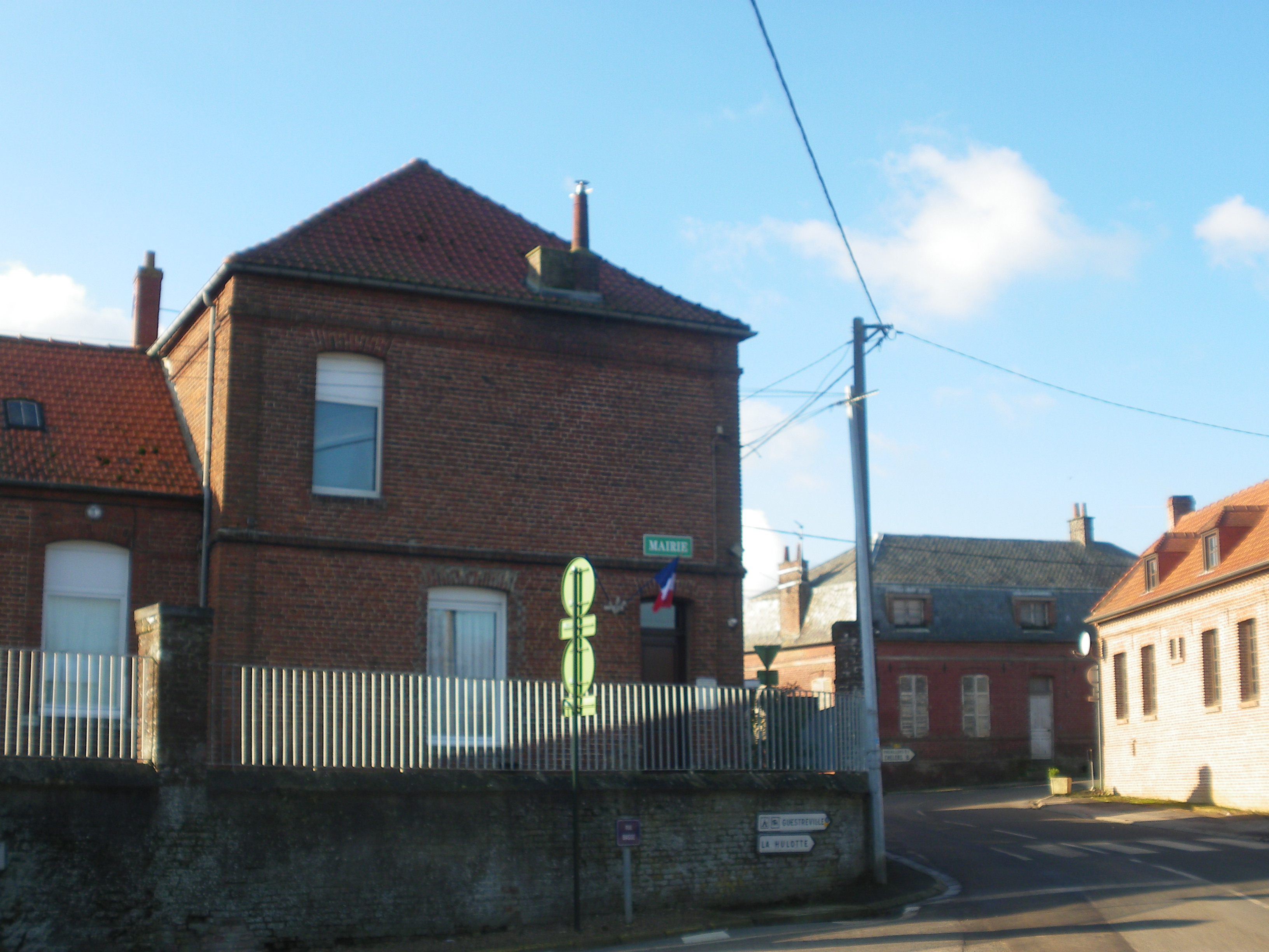 Vue de la mairie d'Hermin.